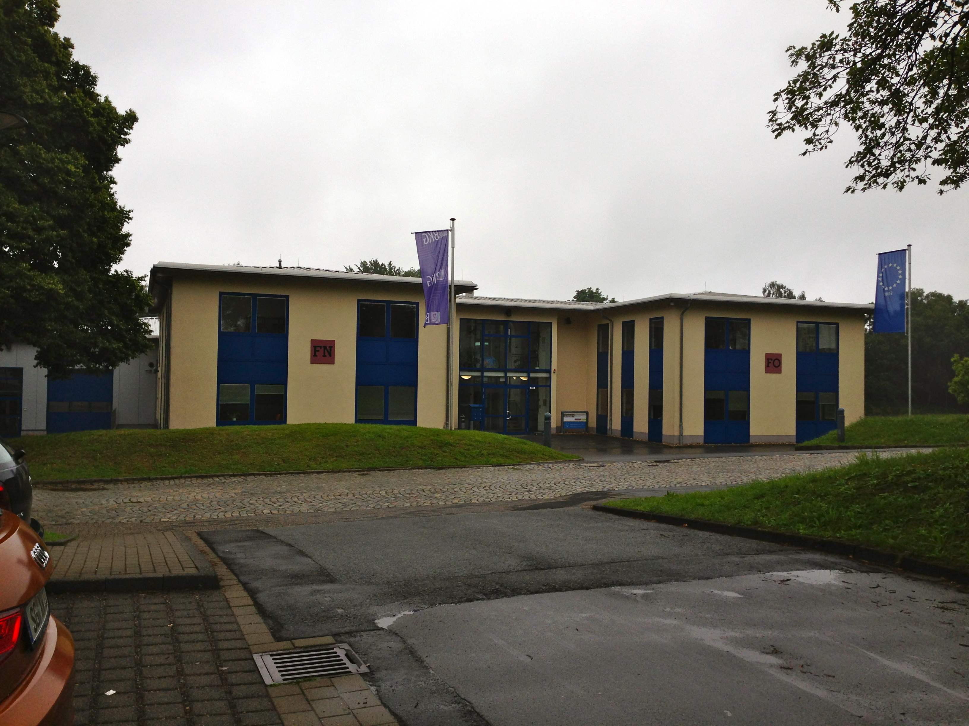 Institutsgebäude am Campus Freudenberg mit BKG und EIIW